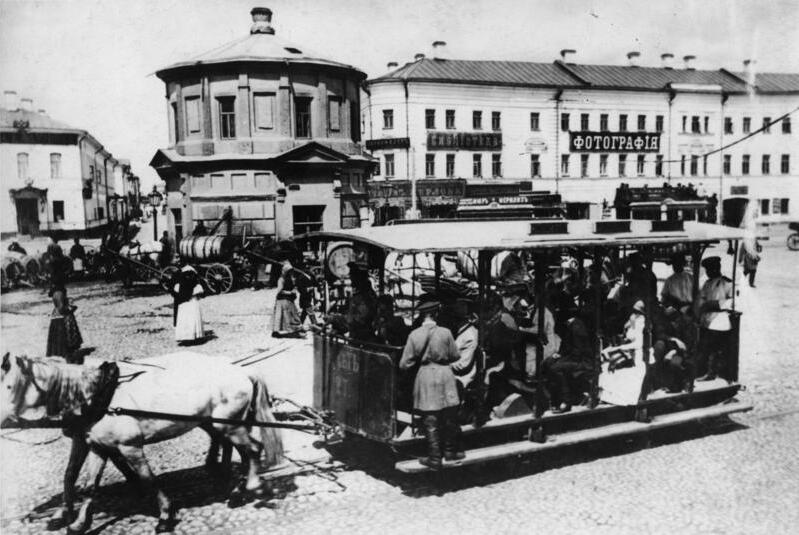 Moskau, Pferdebahn ADN-ZB/Archiv Rußland um 1900 Pferdebahn am Serpuchowski-Tor des alten Moskau. 815-47 [TASS]